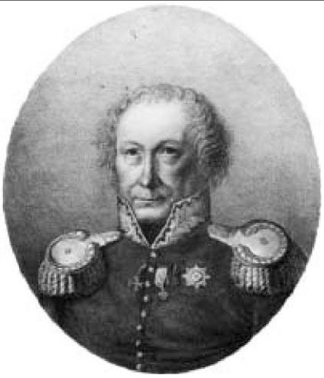 Portrait d'Étienne-François de Sénovert (1753-1861).